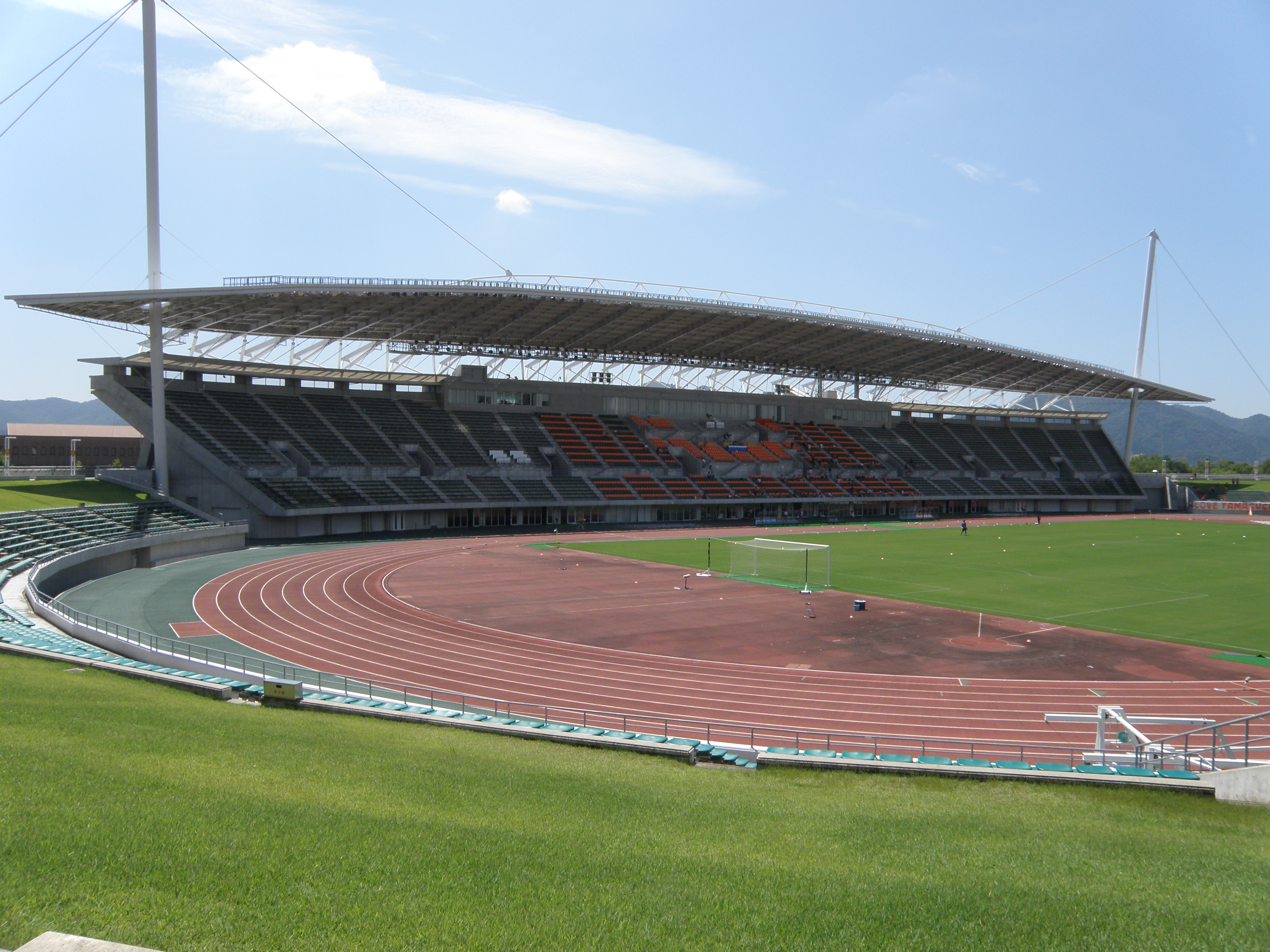 維新百年記念公園陸上競技場メインスタンド 平成27年度山口県サッカー選手権大会決勝にて